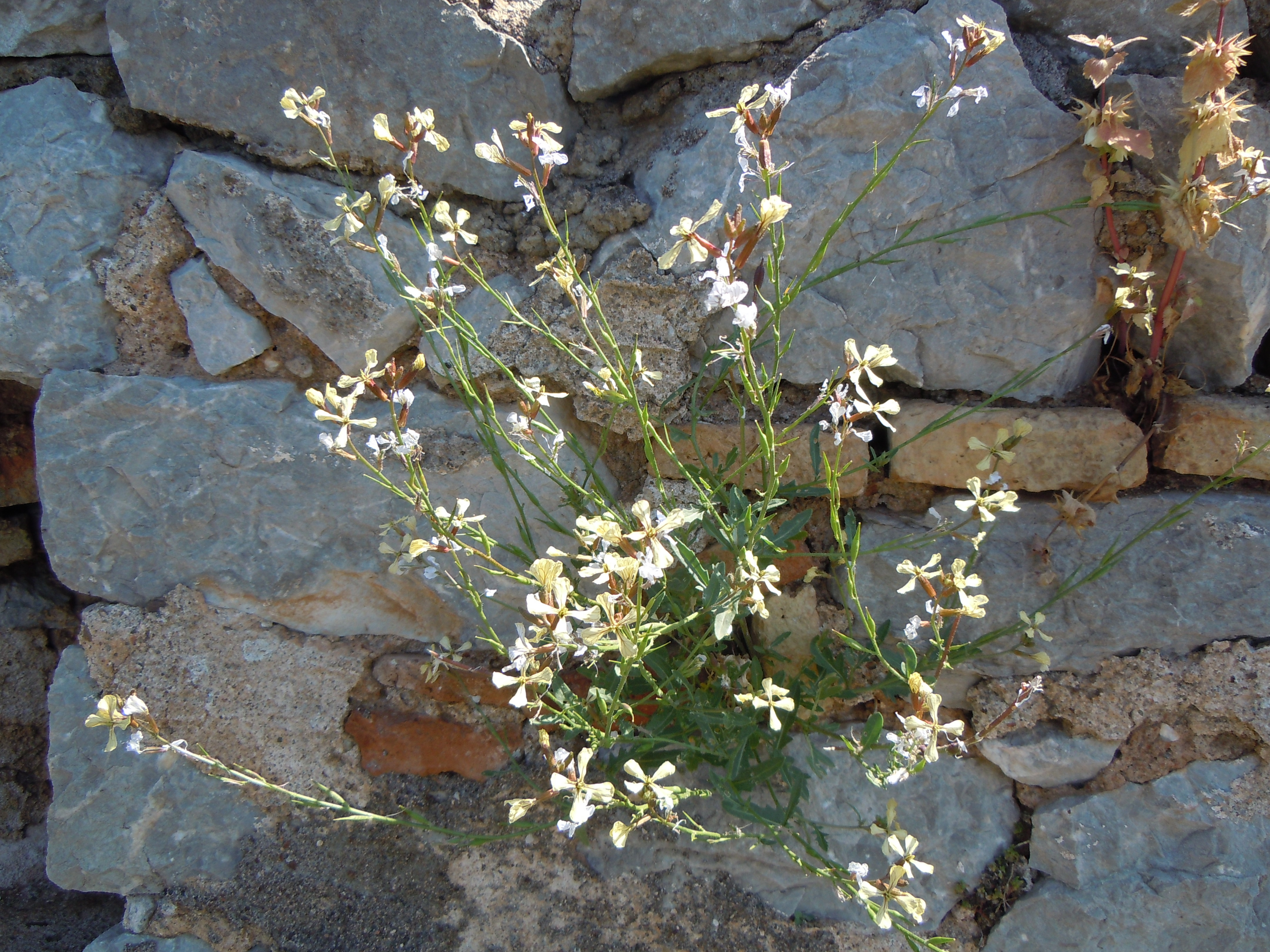 Eruca vesicaria à Nauplie, poussant sur un mur de la Citadelle de Palamède